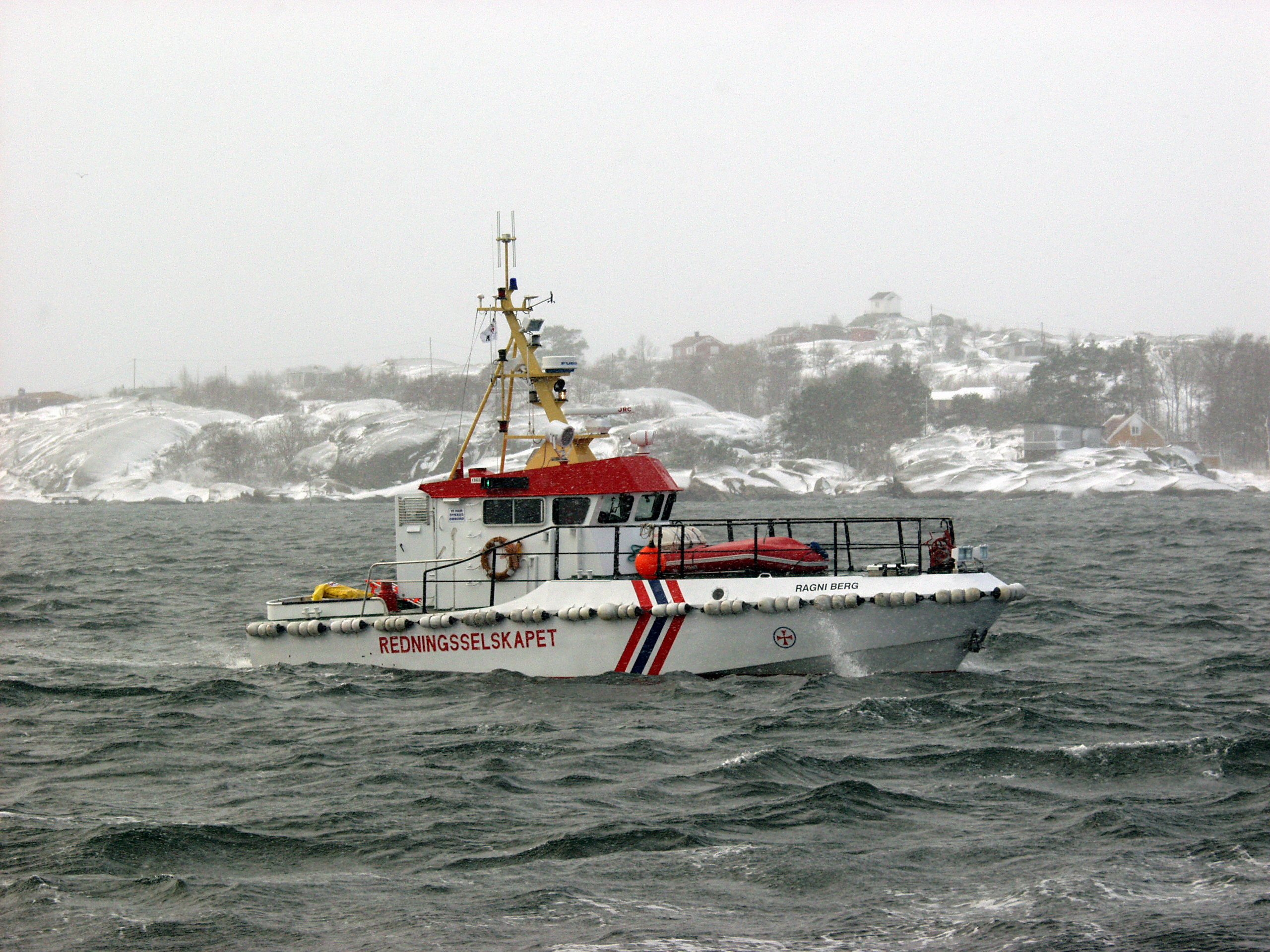 RS 89 "Ragni Berg". Vasser, Vestfold Foto: Ingar Sagedal Bie